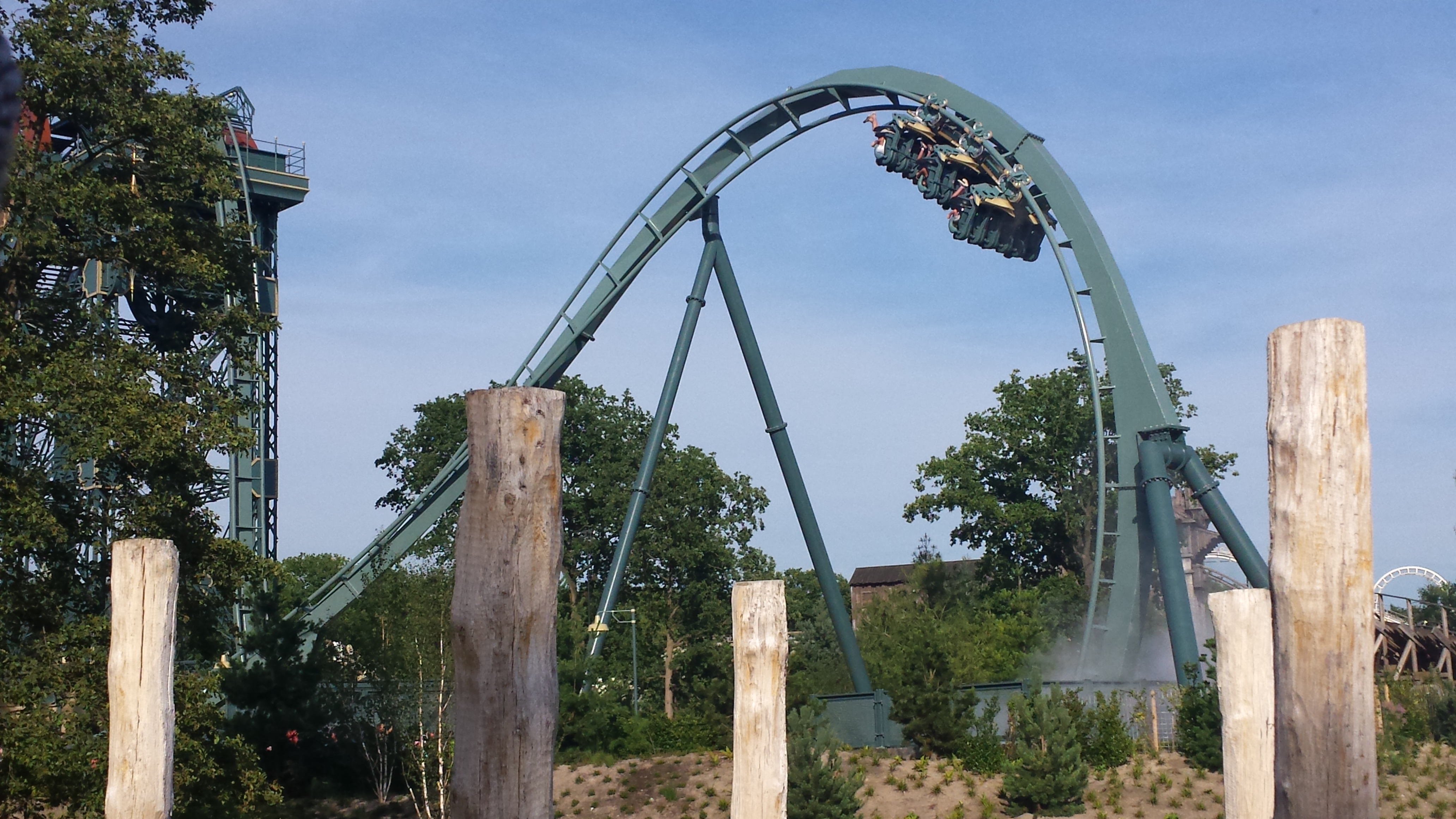 Die Durchfahrt durch den Immelmann